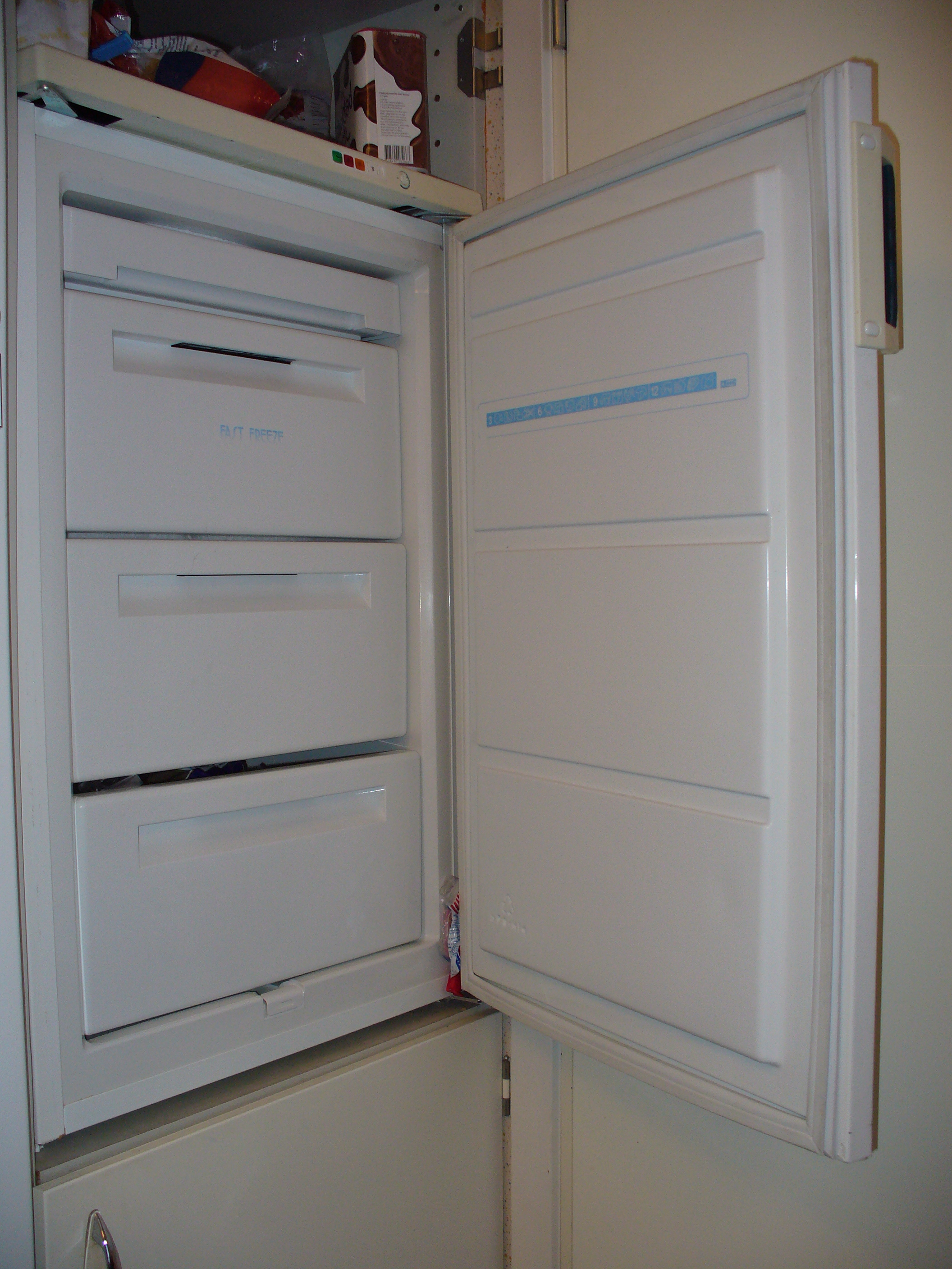 Freezer with open door.